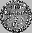 Гривеник